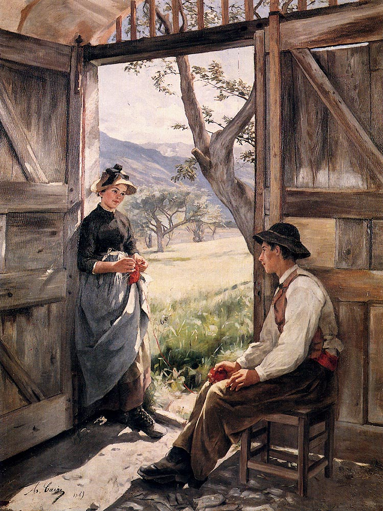 Jeunes paysans